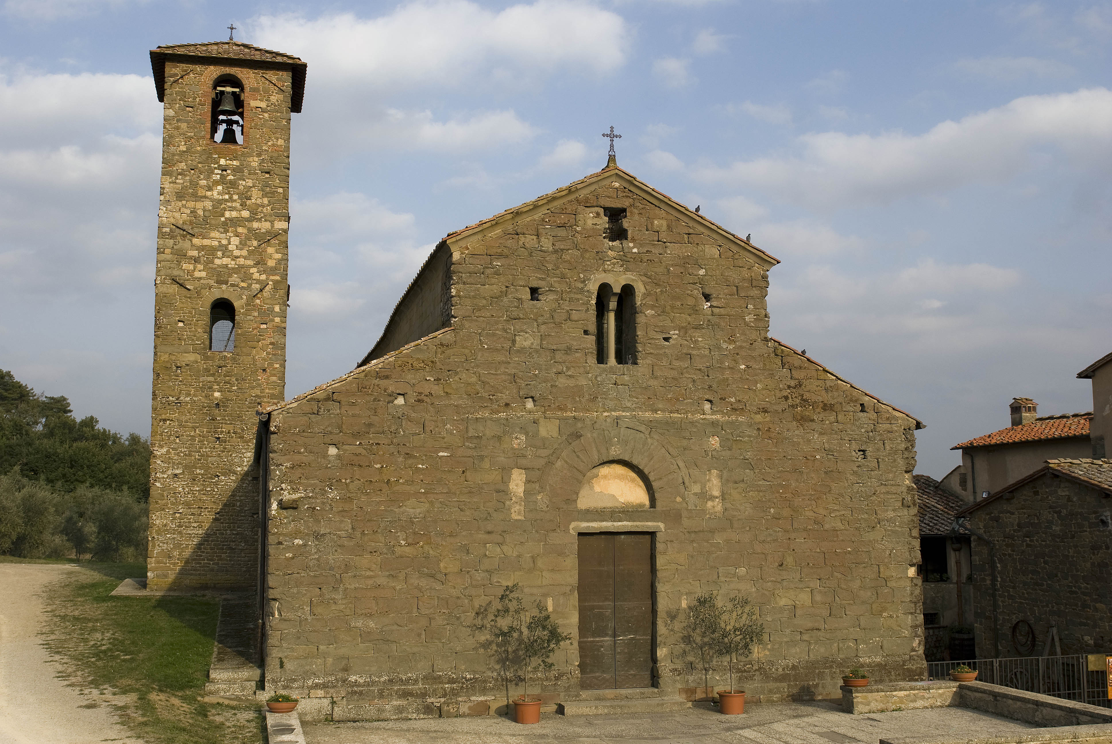 Facciata Pieve di san Romolo a Gaville (Figline Valdarno)